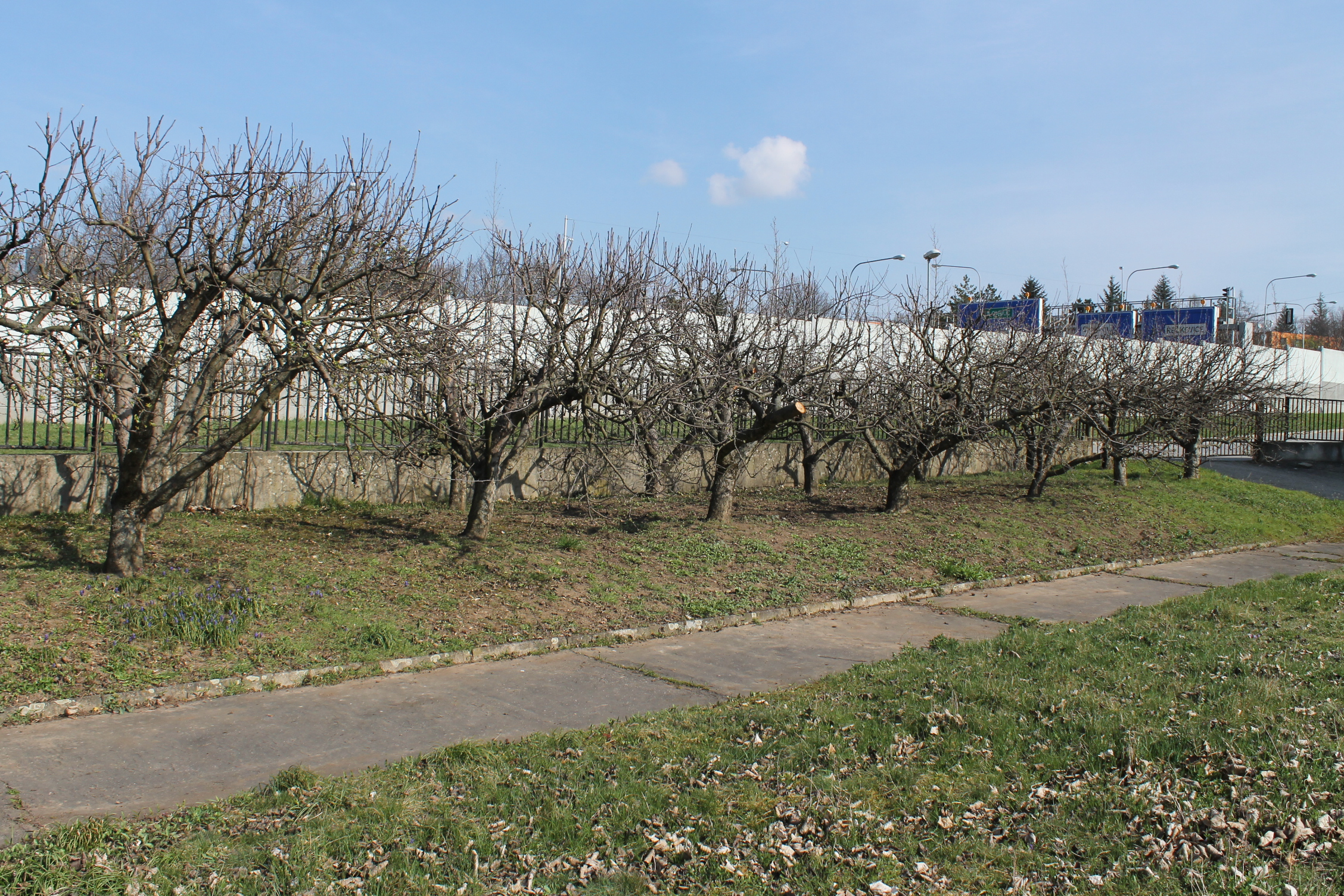 jabloňový sad, pravidelně udržovaný